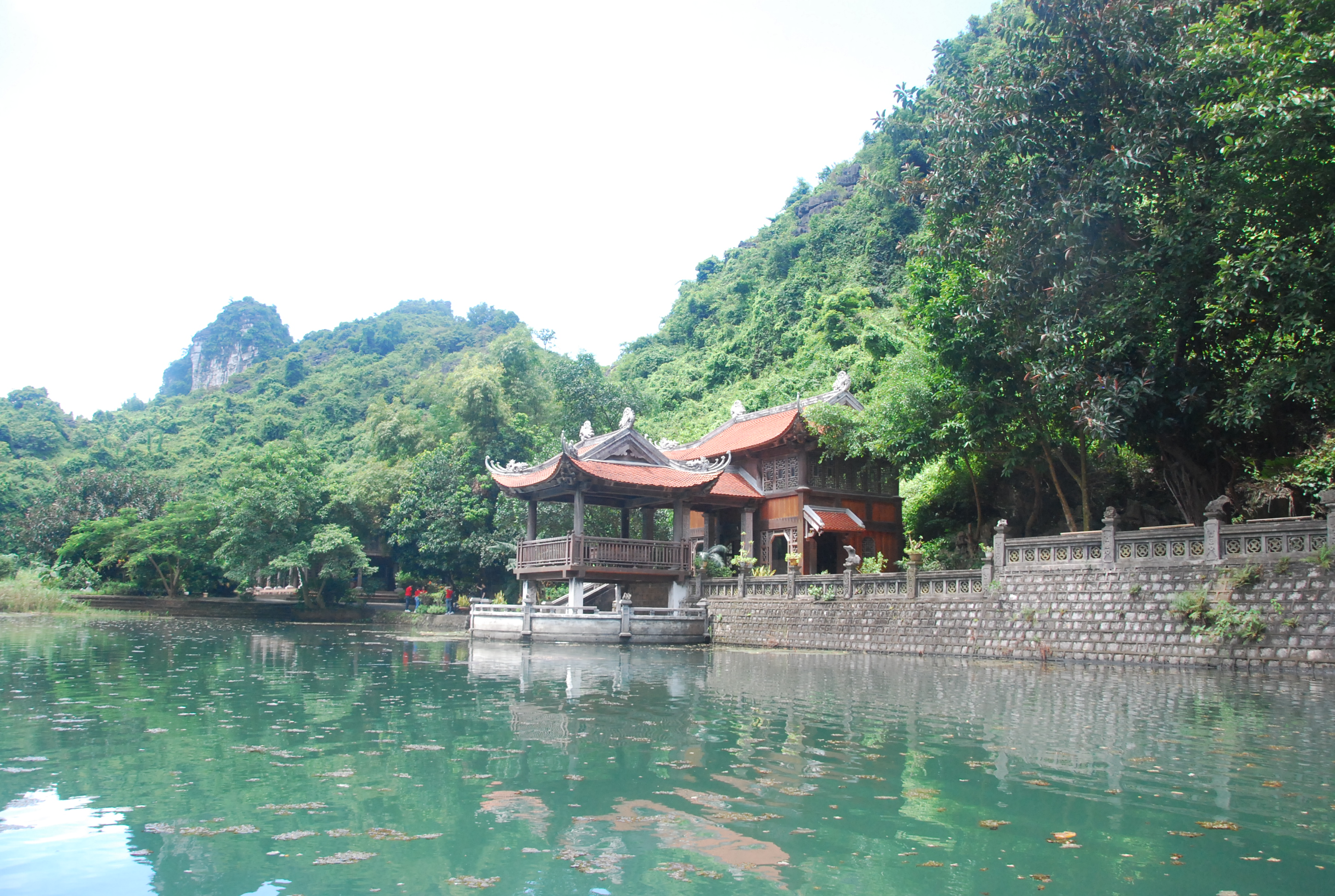 Phong cảnh khu du lịch sinh thái Tràng An ở Ninh Bình